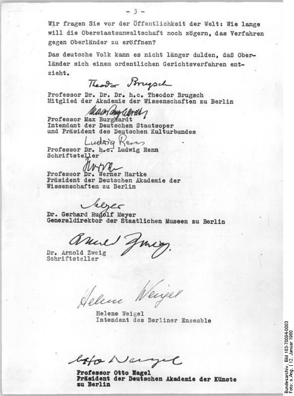 Berlin, Schreiben Einleitung Verfahren gegen Oberländer Zentralbild Repro 12.1.1960 Berlin: Namhafte Persönlichkeiten fordern Einleitung eines Verfahrens gegen Oberländer Namenhafte Persönlichkeiten der DDR haben in einem Schreiben an den Bonner Oberstaatsanwalt Drugh die Forderung nach Einleitung eines Verfahrens gegen den Bonner Minister Oberländer erhoben. In dem Brief wird unter anderem die Empörung zum Ausdruck gebracht, dass in Bonn noch immer ein Minister amtiert, der an entscheidender Stelle den zweiten Weltkrieg vorbereiten half und persönlich für die Ausrottungspolitik des Dritten Reiches verantwortlich ist. (Wortlaut des Briefes siehe Faksimilie). [Schreiben mit Unterschriften von Theodor Brugsch, Max Burghardt, Ludwig Renn, Werner Hartke, Gerhard Rudolf Meyer, Arnold Zweig, Helene Weigel, Otto Nagel] Abgebildete Personen: Nagel, Otto Prof.: Maler, Präsident der Akademie der Künste (AdK), Nationalpreisträger, Vaterländischer Verdienstorden (VVO) in Gold, DDR (PND 118586300)